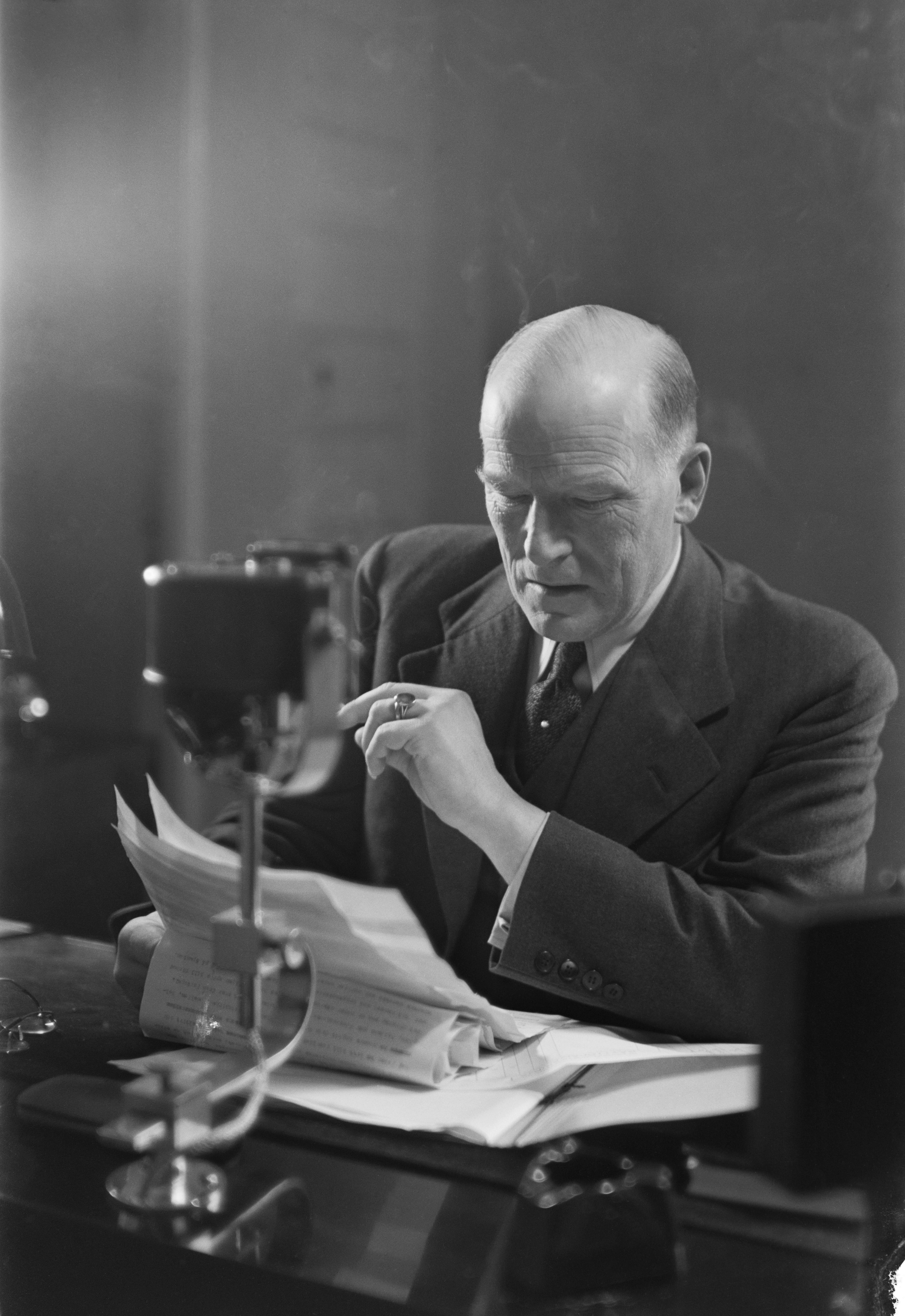 Reportteri ja kuuluttaja Alexis af Enehjelm oli Yleisradion ensimmäinen kuuluttaja ja ohjelmanjärjestäjä 1926 - 1927. Vuosina 1933 - 1939 hän toimi apukuuluttajana, reportterina ja selostusosaston päällikkönä. Kuvausaika arvioitu vuosikymmenen tarkkuudella. Tiedätkö jotain tästä kuvasta? Jätä kommentti tai ota yhteyttä sähköpostitse: Tutustu Ylen arkistosisältöihin: Fler skatter från Yles arkiv: More about Yle, the Finnish Broadcasting Company